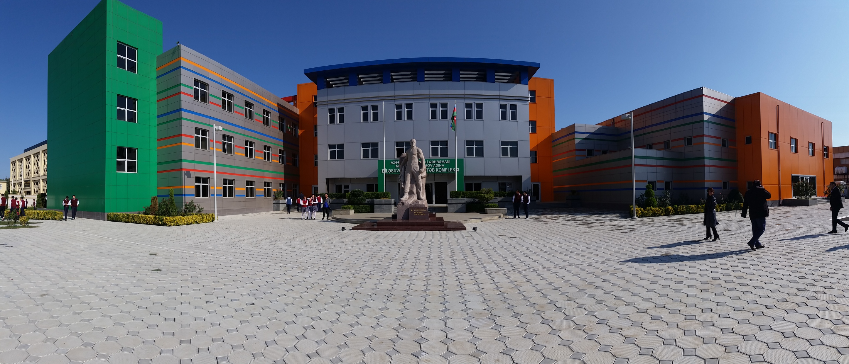 Kompleks heyet